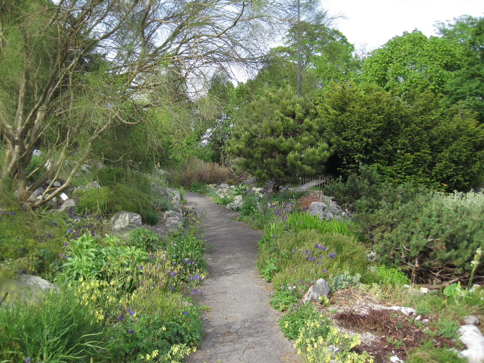 Jardin botanique de Besançon